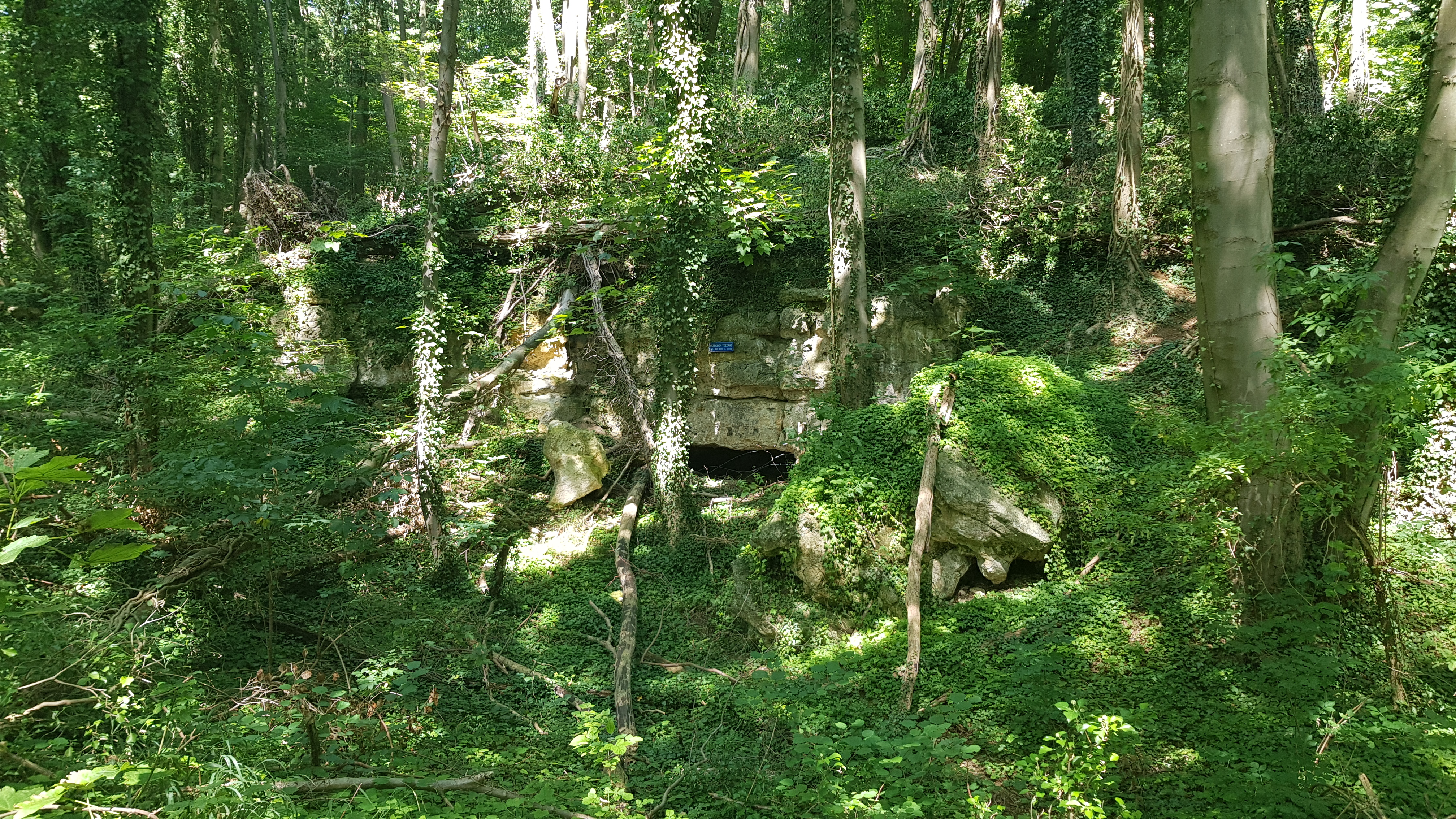 Groeve van de Verdwenen Honden (Biebosch), Valkenburg, Nederland